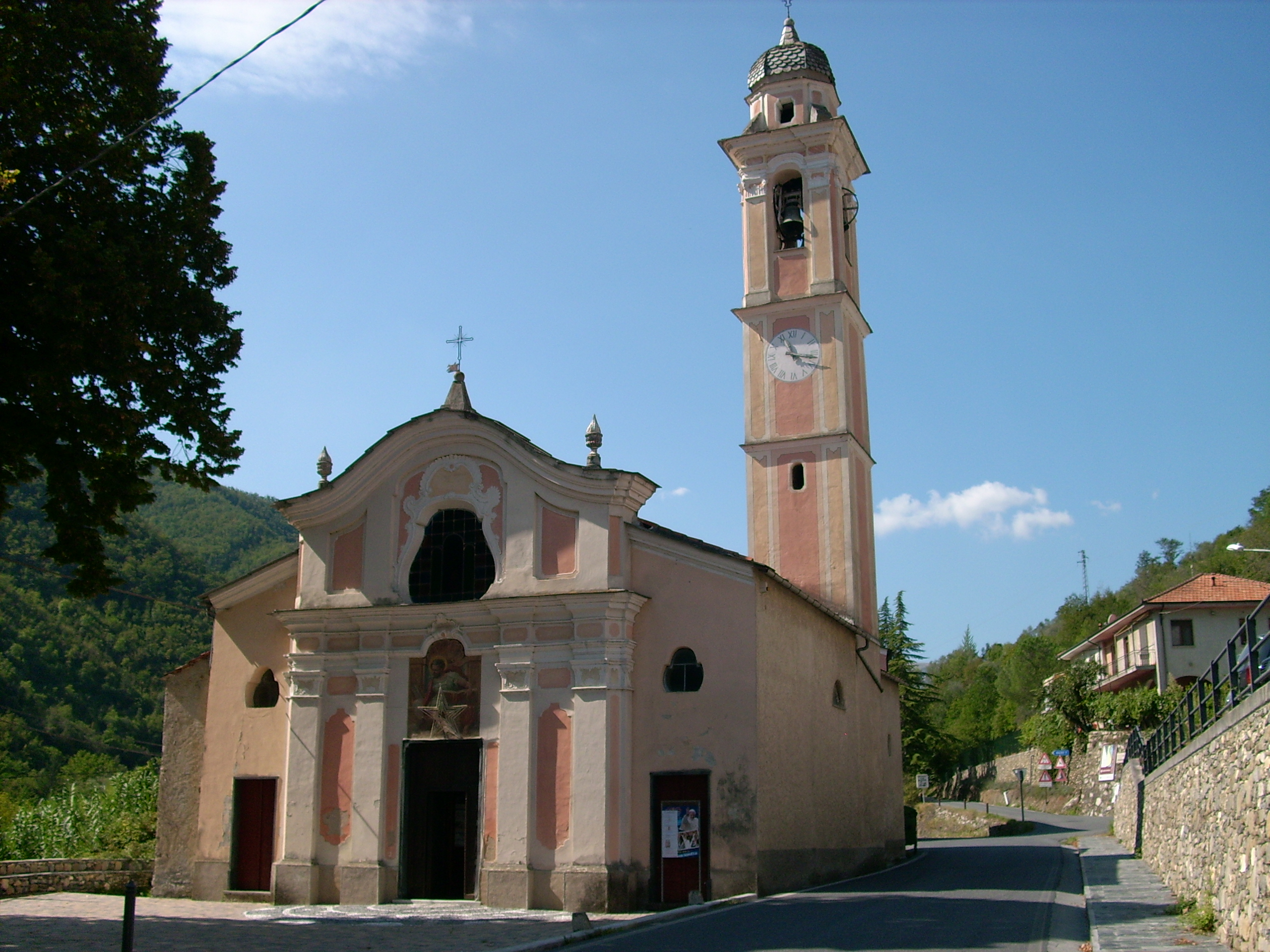 Chiesa di Borghetto d'Arroscia, Liguria, Italia